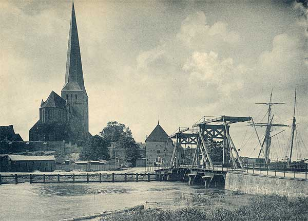 Petritor Rostock 1893